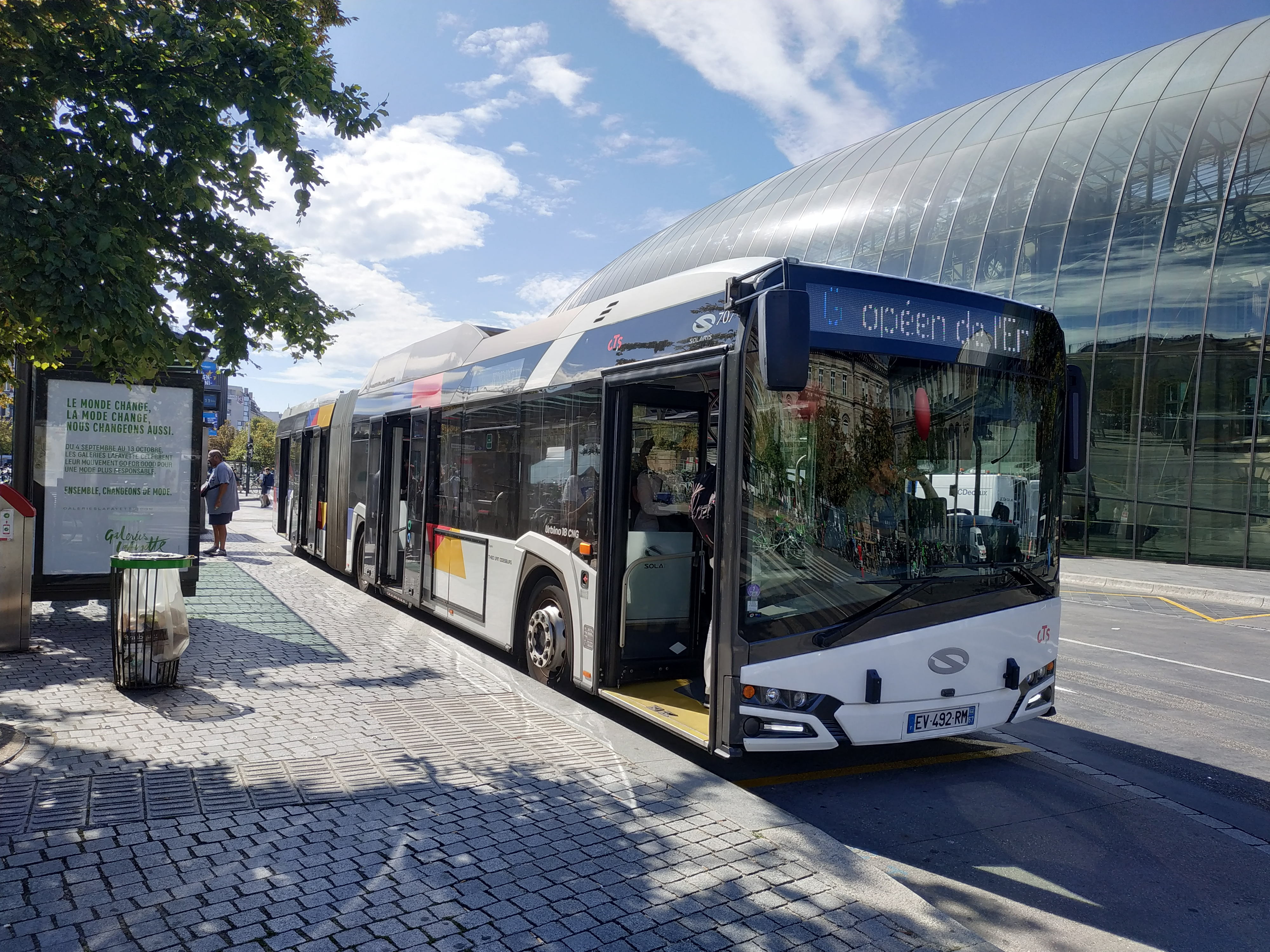 Solaris Urbino 18 de la CTS. Cet exemplaire circule en renfort sur la ligne G et a reçu la livrée extérieure "Theo Van Doesburg" des Mercedes-Benz Citaro G circulant sur la ligne. Aucun autre exemplaire Solaris Urbino ne porte cette livrée.